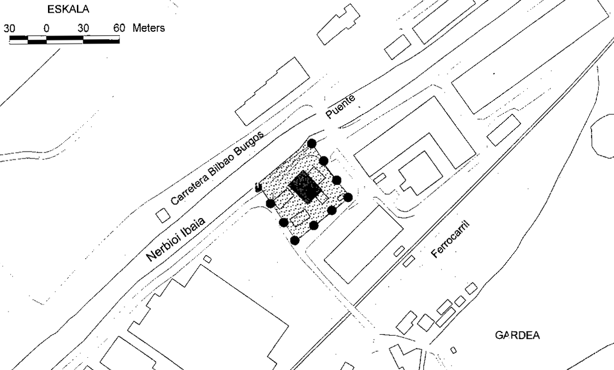 Laudioko Katuxa jauregiaren kokapen-planoa.